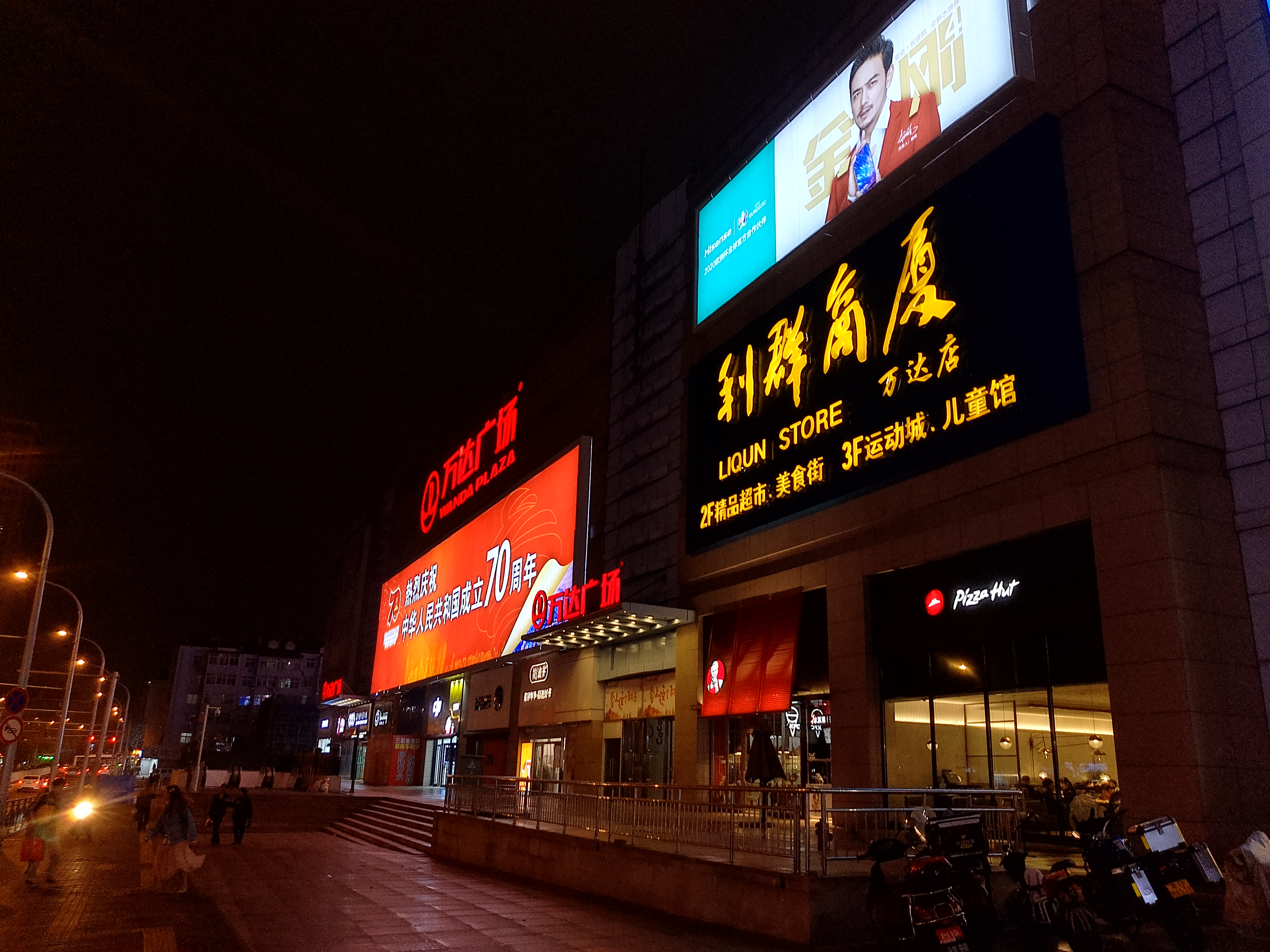 青岛台东万达广场位于台东一路的正门，临近青岛地铁台东站。